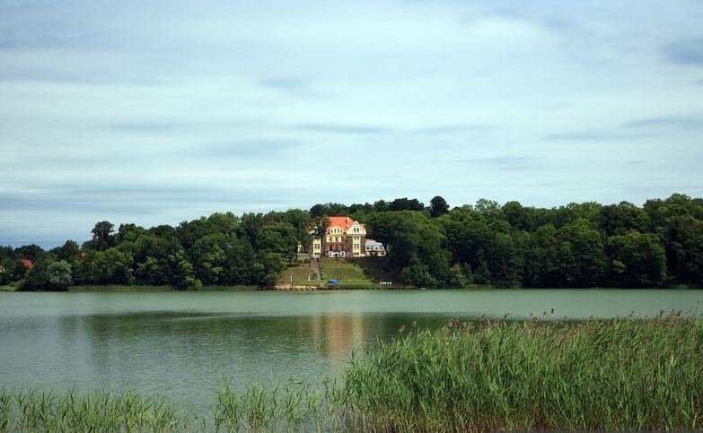 Ublik, województwo warmińsko-mazurskie, powiat piski, gmina Orzysz